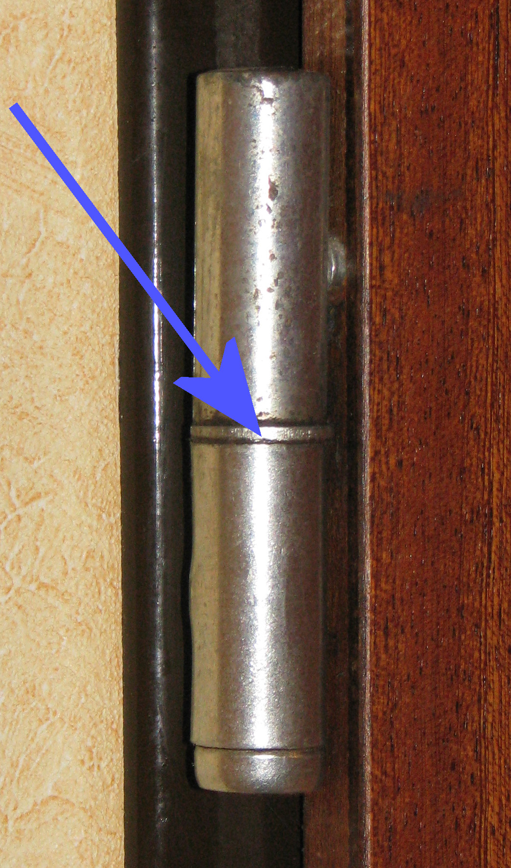 Türscharnier mit Fitschenring